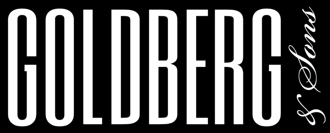 Logo